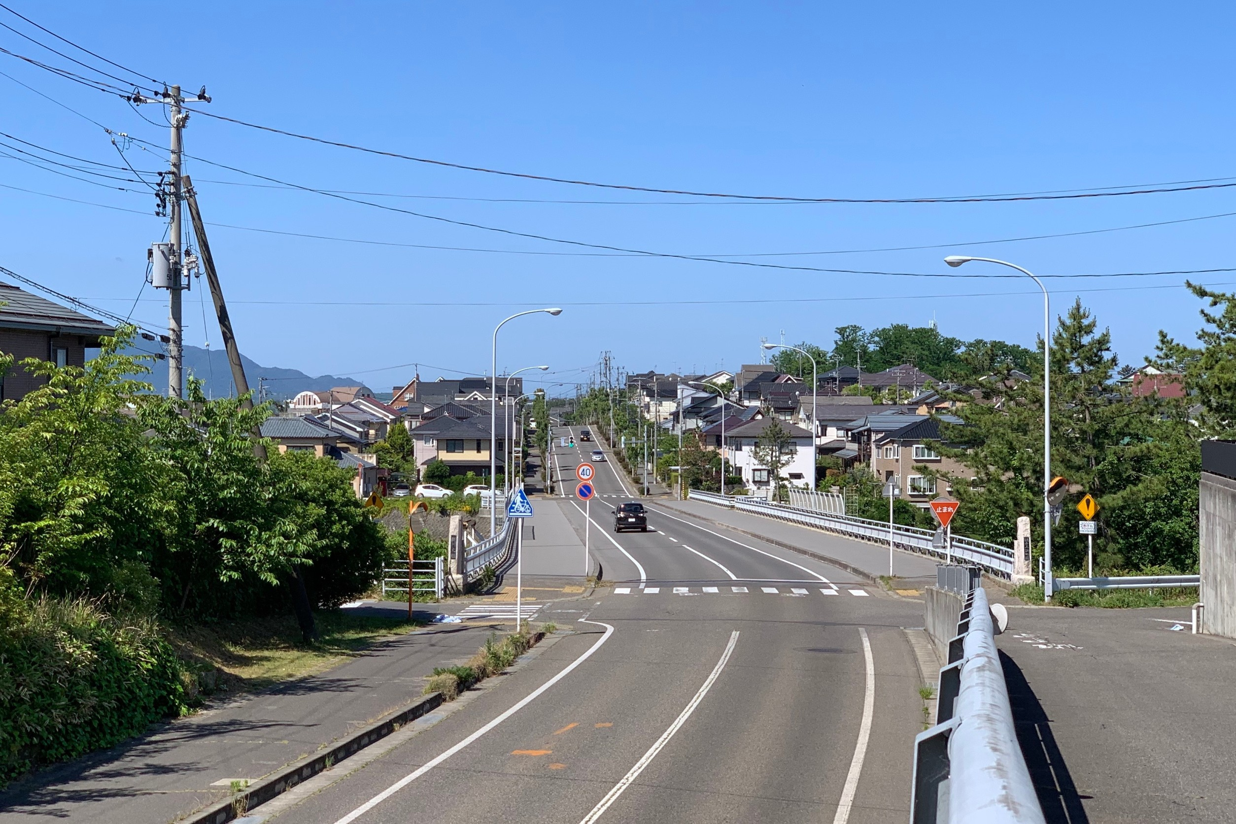 新川に架かる新川元橋（新潟市西区，2020年6月）